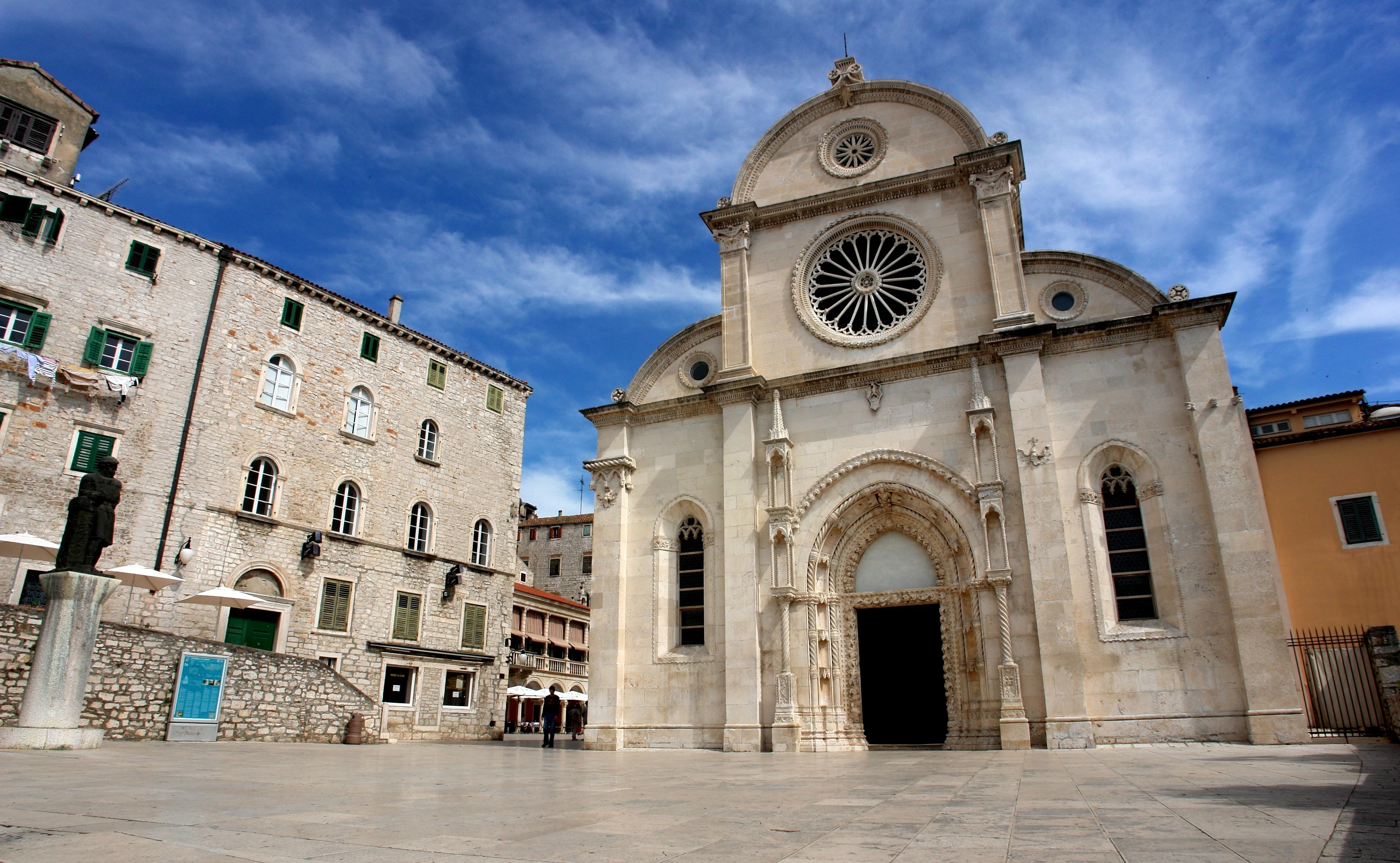 Szent Jakab székesegyház, Sibenik (Sebemico). Katedrala Sv. Jakova, Sibenik. Cathedral of St. James, Šibenik.